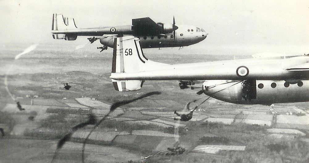 Exercice de sauts de parachutistes français depuis des Nord 2501 Noratlas à la fin des années 1950.